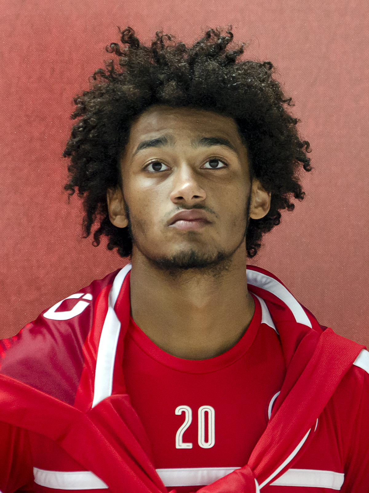 Emmanuel Iyoha, deutscher Fußballspieler (2016)